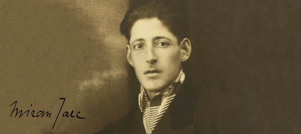 Miran Jarc je bil aktiven soustvarjalec kulturnega gibanja novomeška pomlad. Takrat dvajsetletnega Jarca je Rihard Jakopič v pismu Antonu Podbevšku takole označil, ko je obujal spomine na 26. september 1920: »Ob splošni tihoti se prikaže mistična postava Mirana Jarca. Pobožno kakor romar, ki se poda na božjo pot, je stopil na oder in s skrivnostnim glasom je bral odlomke iz svojega Skrivnostnega romarja. Ko je končal, je sledilo prisrčno priznanje besedam odhajajočega mladega, upa polnega pisatelja.« (Mušič, 1974, str. 94)